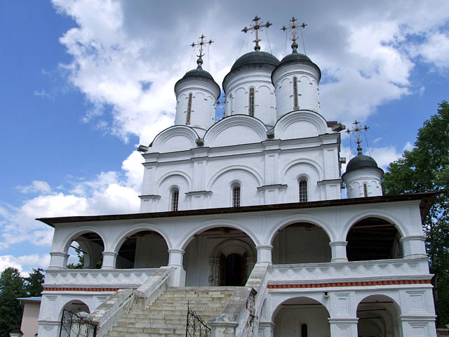 Усадьба Вяземы. Церковь Преображения.